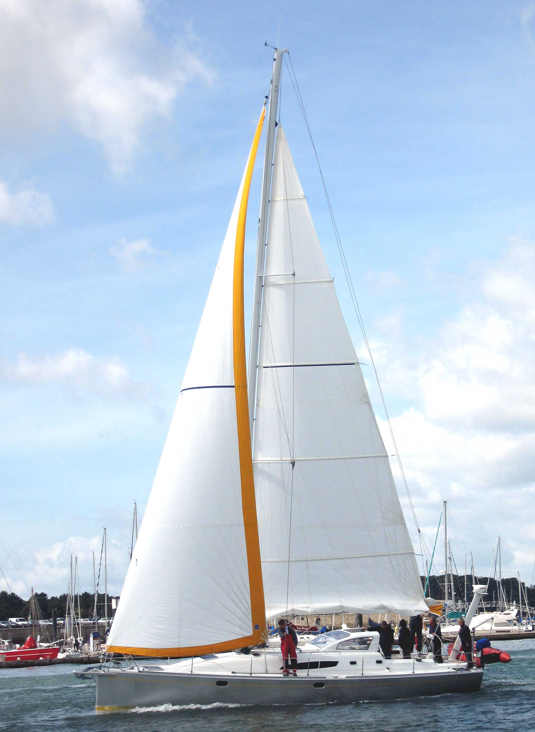 Description : Voilier sous un ris Place : Lorient, Bretagne, France Date : 2006 Auteur : Pline